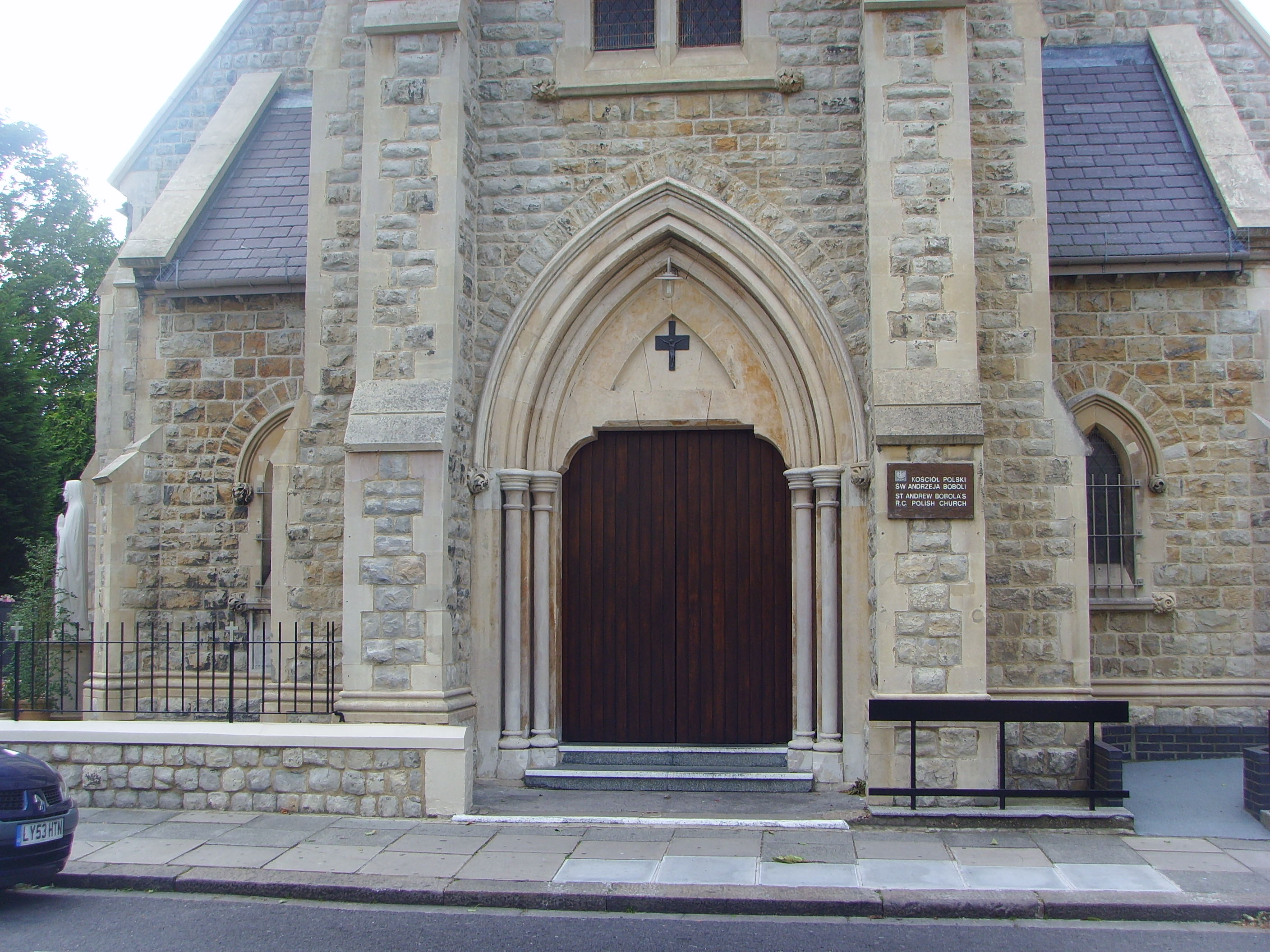 Kościół pod wezwaniem Andrzeja Boboli w Londynie